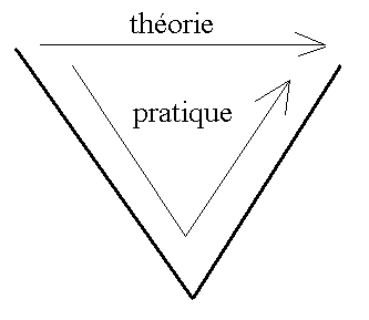 théorie sur la différence entre la théorie et la pratique avec le cycle en V